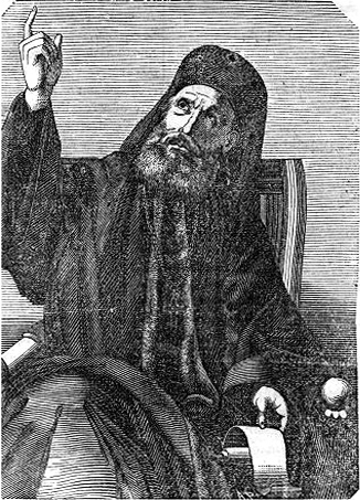 Γρηγόριος Ε΄ πατριάρχης Κωνσταντινουπόλεως